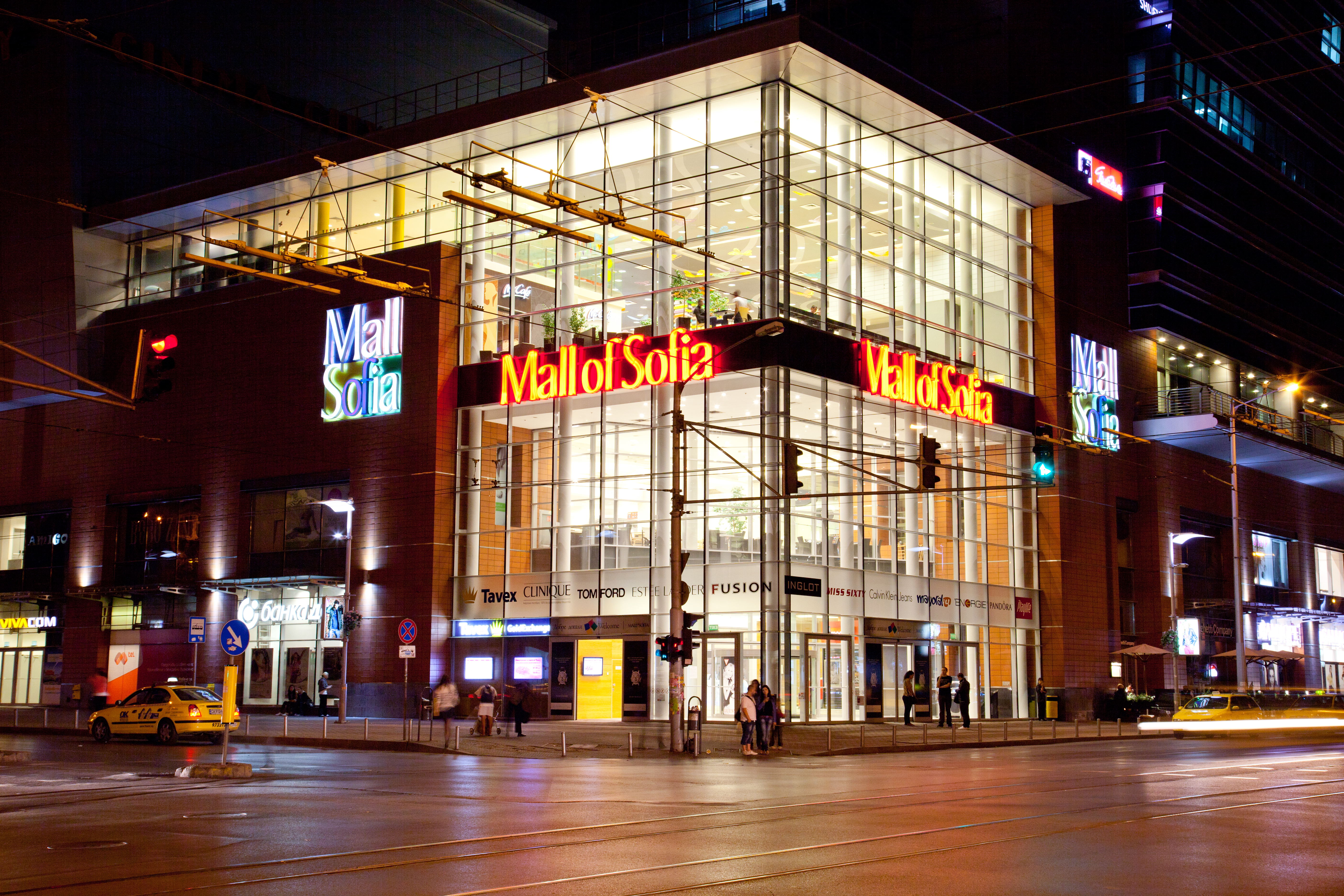 Mall of Sofia; Sofia bei Nacht